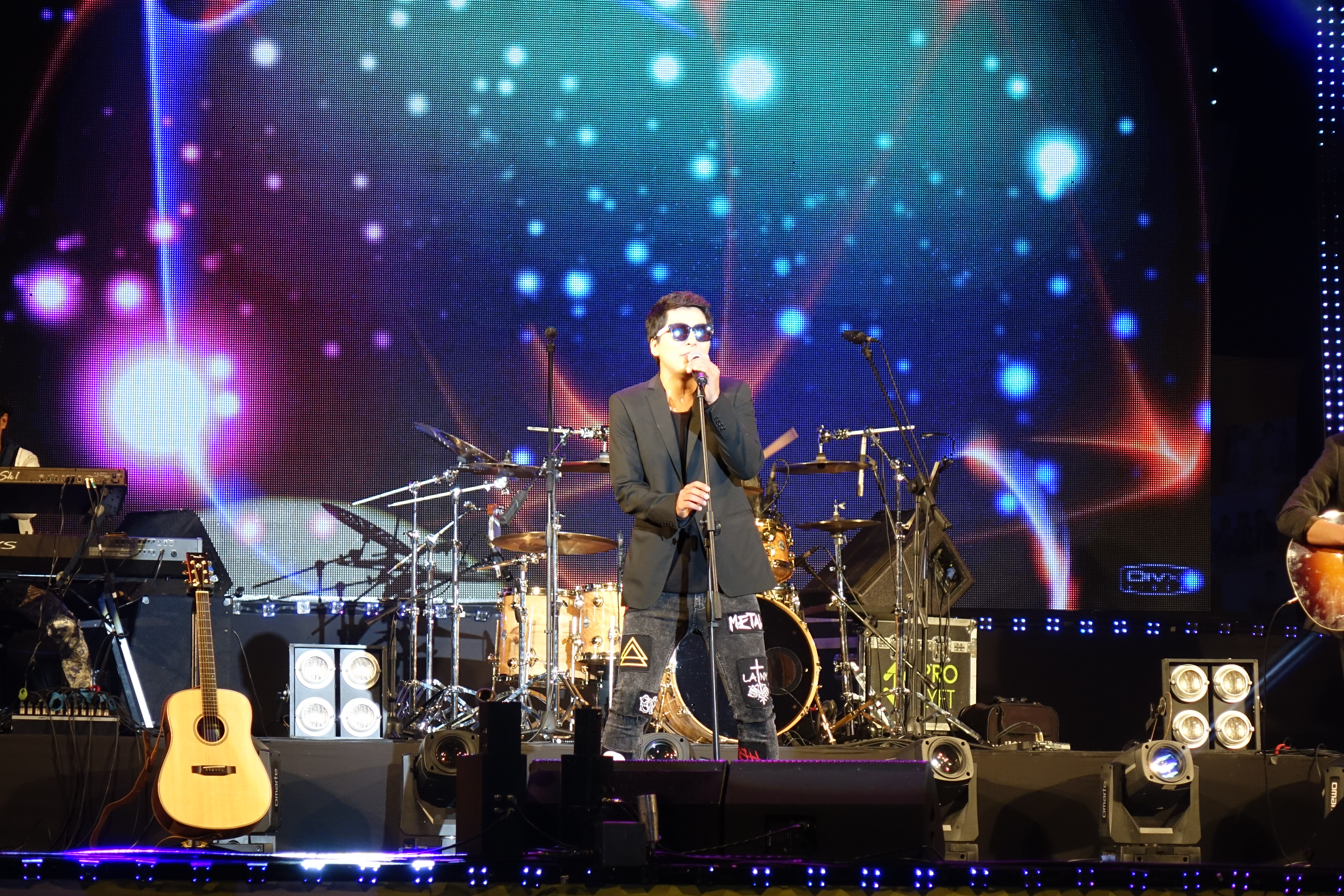 윤희석, 겟 투게더 락 페스티벌(서울대공원)